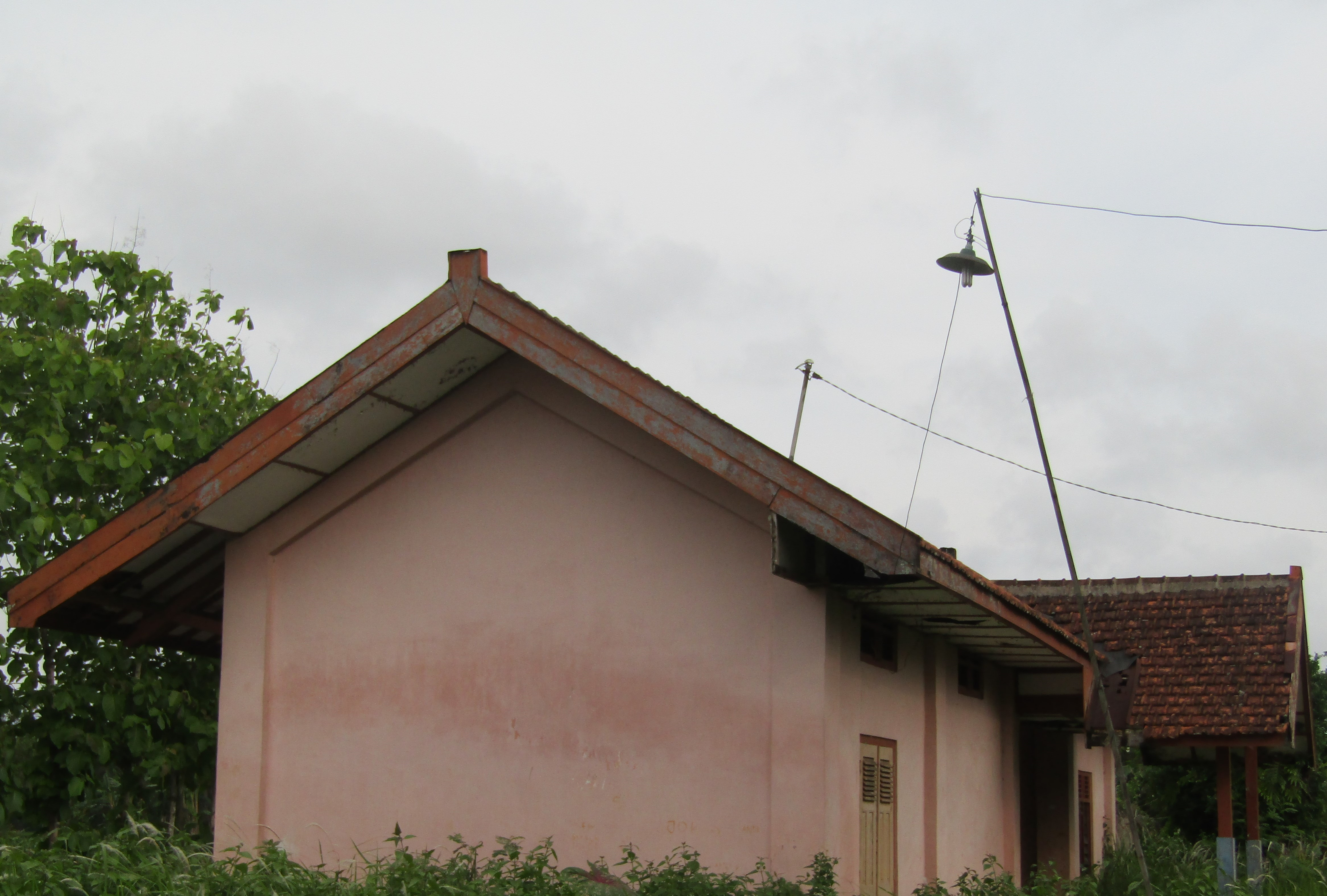 Stasiun Montelan, 2018